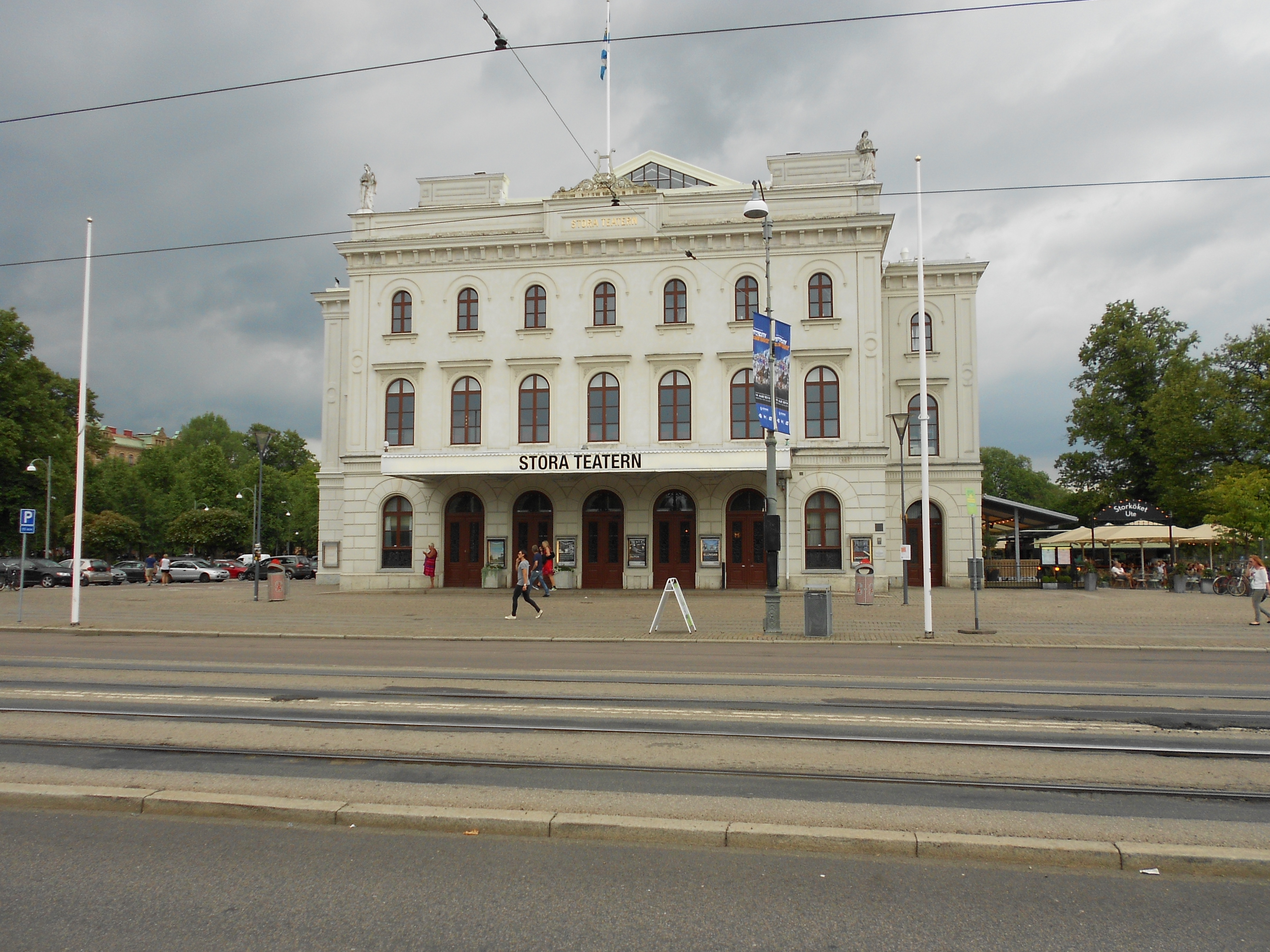 Goteborg StoraTeatern